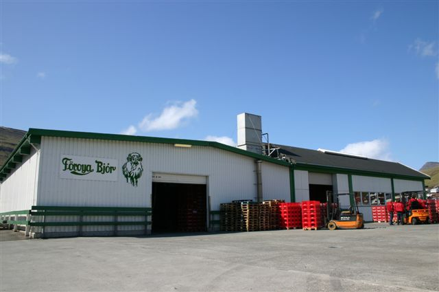 Föroya Bjór brewery, Klaksvík